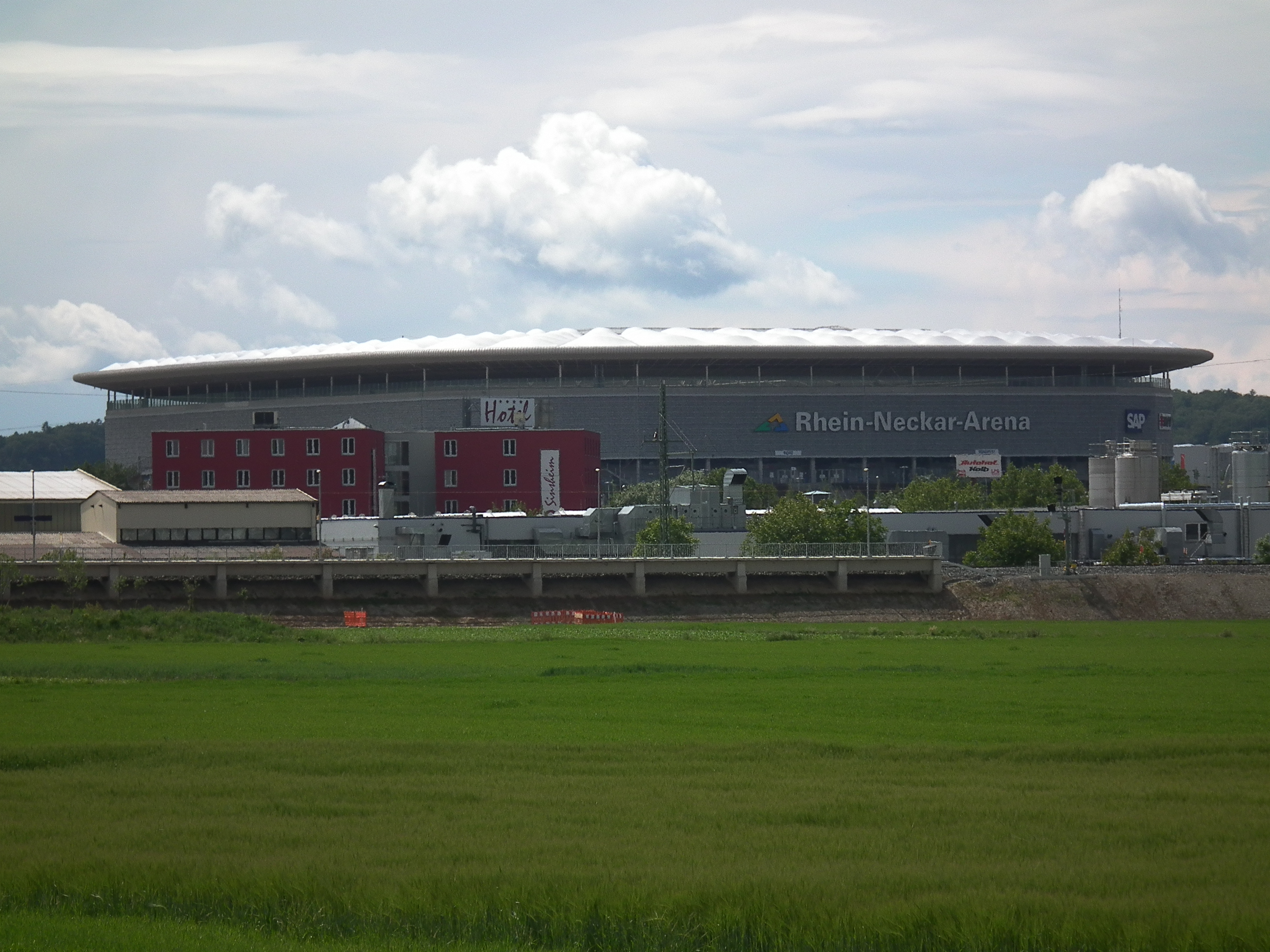 Rhein-Neckar-Arena in Sinsheim (Baden-Württemberg, Deutschland)